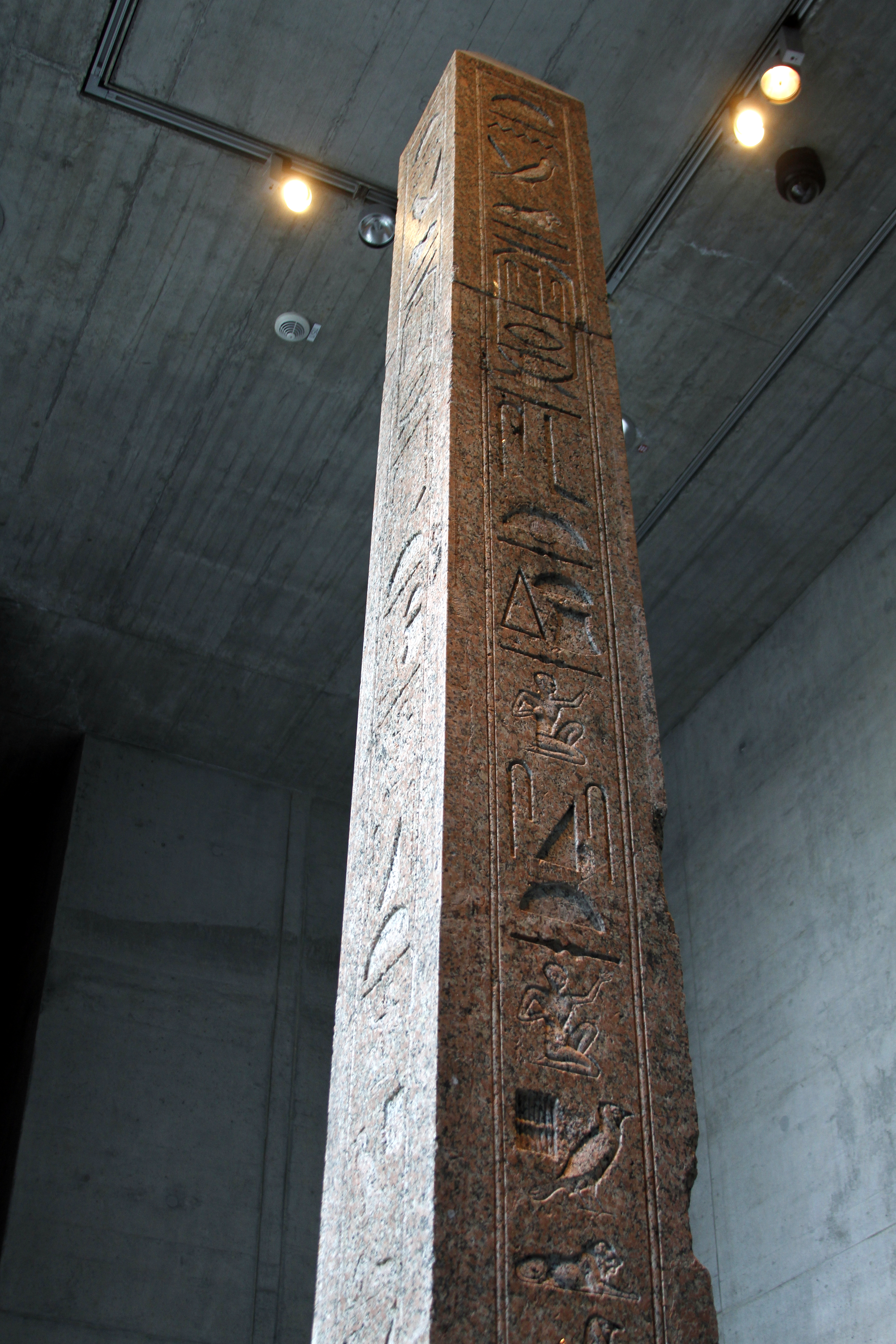 Ägyptisches Museum - Munich - Germany